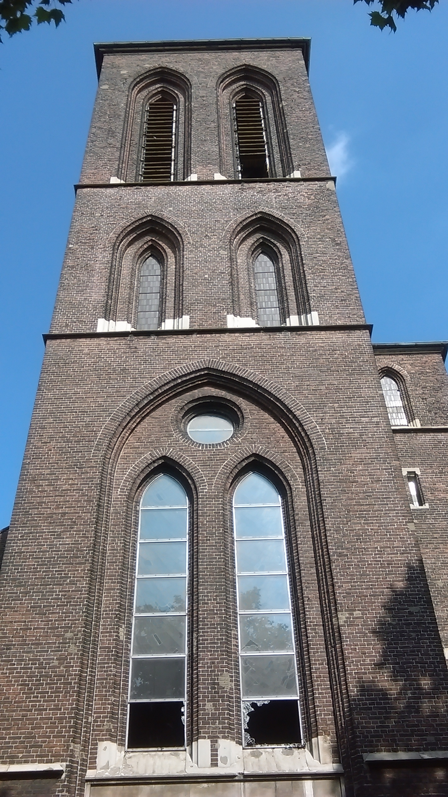 ehemalige Kirche St. Anna in Essen-Altendorf; erbaut 1907, niedergelegt im Sommer 2015